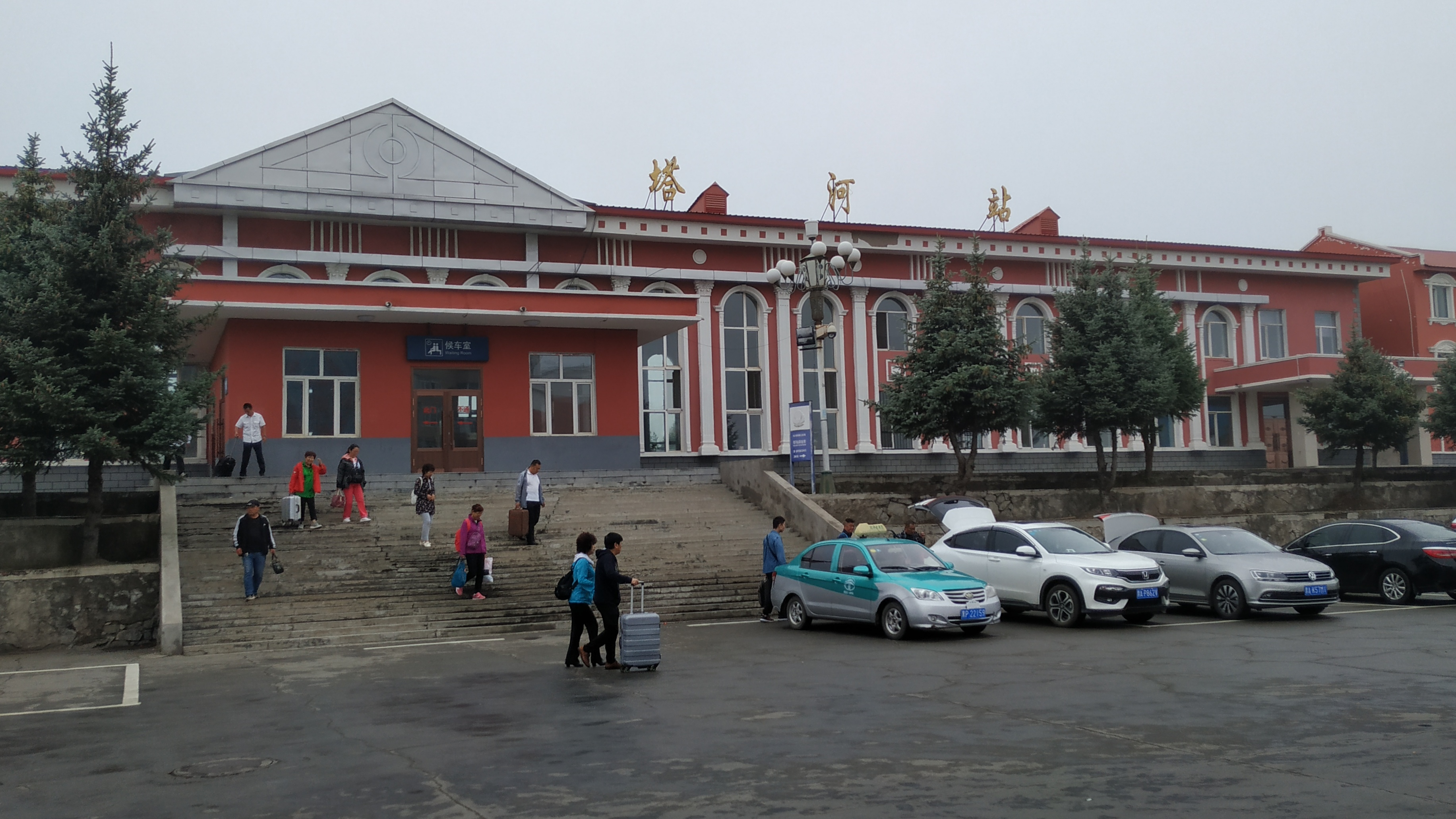 中文（中国大陆）: 塔河火车站